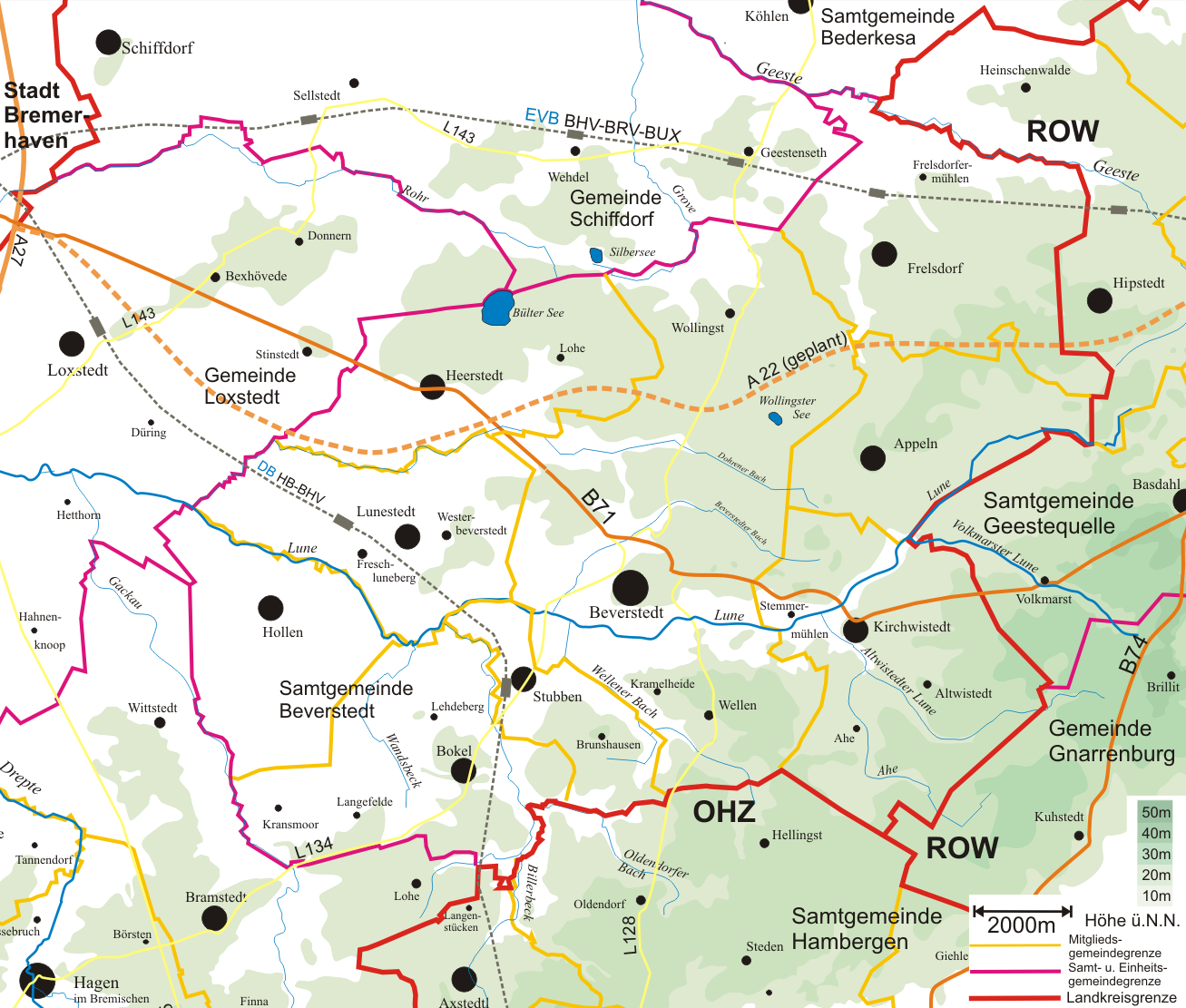 Topografische Karte der Gemeinde Beverstedt mit Nachbargemeinden